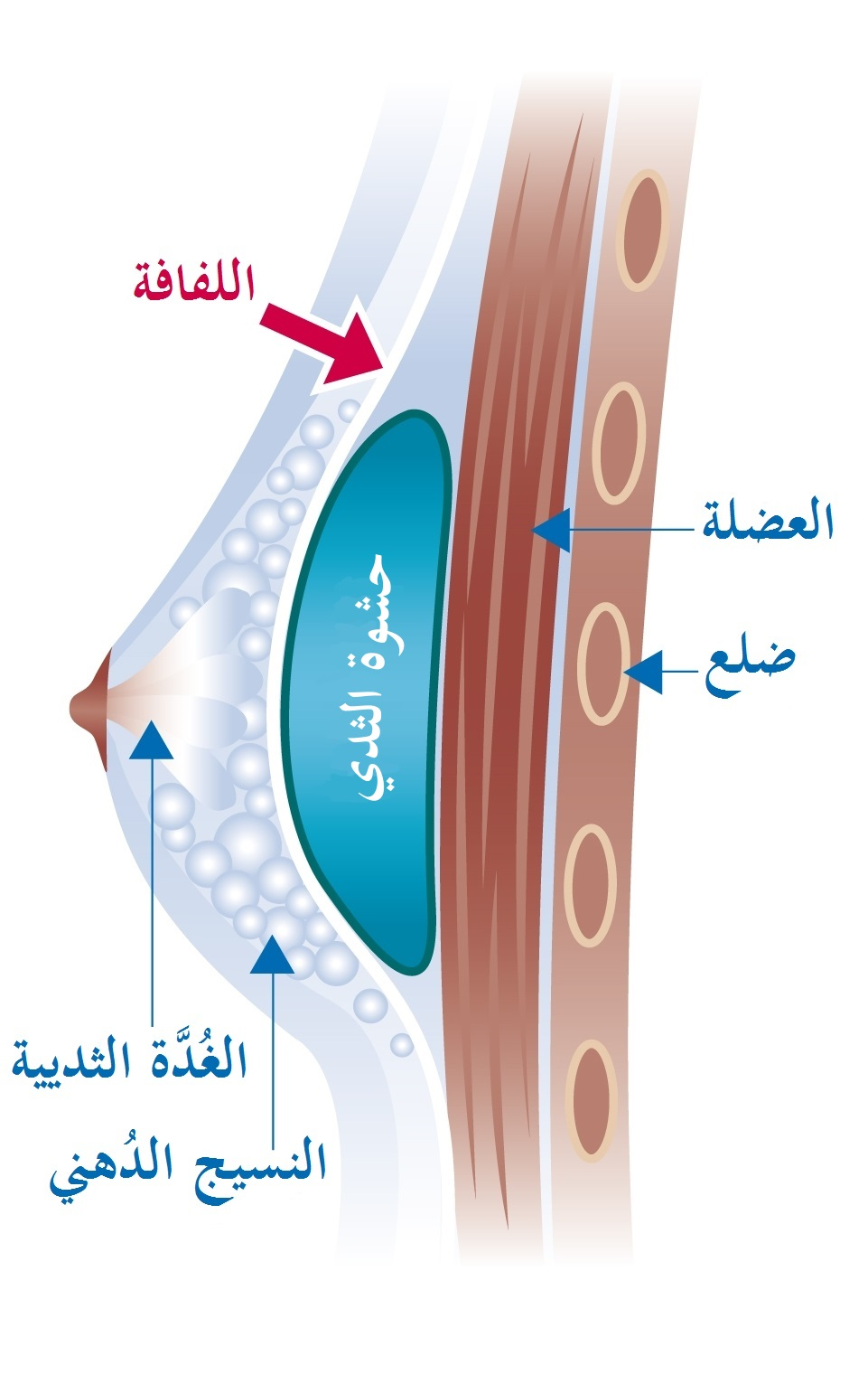 رسمٌ بيانيٌّ يُوضح موضع حشوة الثدي في صدر المرأة بعد إجراء عمليَّة جراحيَّة لِتكبير الثدي. تحتملُ هذه الجراحة مخاطر كبيرة، أبرزها عدم اتخاذ الحشوة للشكل المُلائم وانكماشها، وحُصول بعض الارتخاء في عضلات الصدر كنتيجةٍ لِهذا.